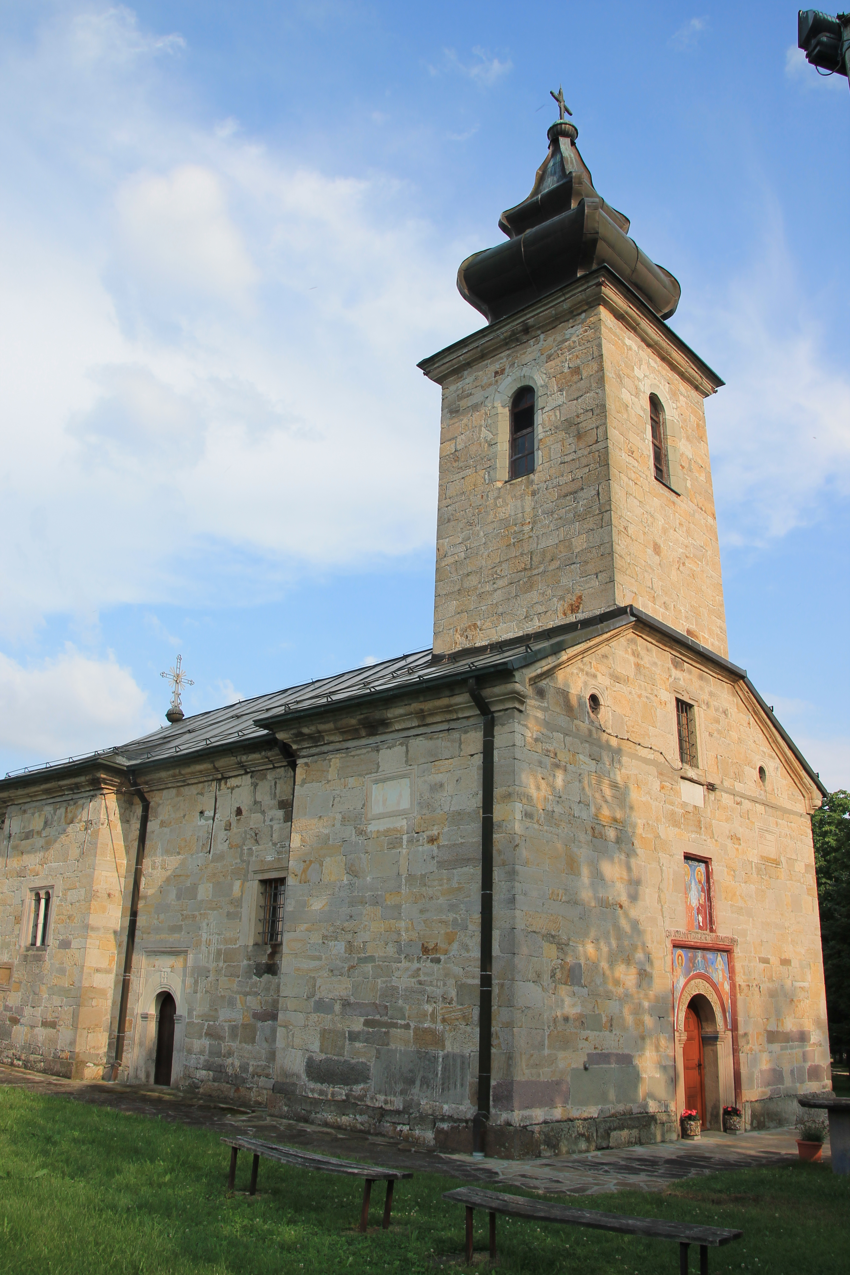 Crkva Sv. Petra i Pavla (Mrčajevci)